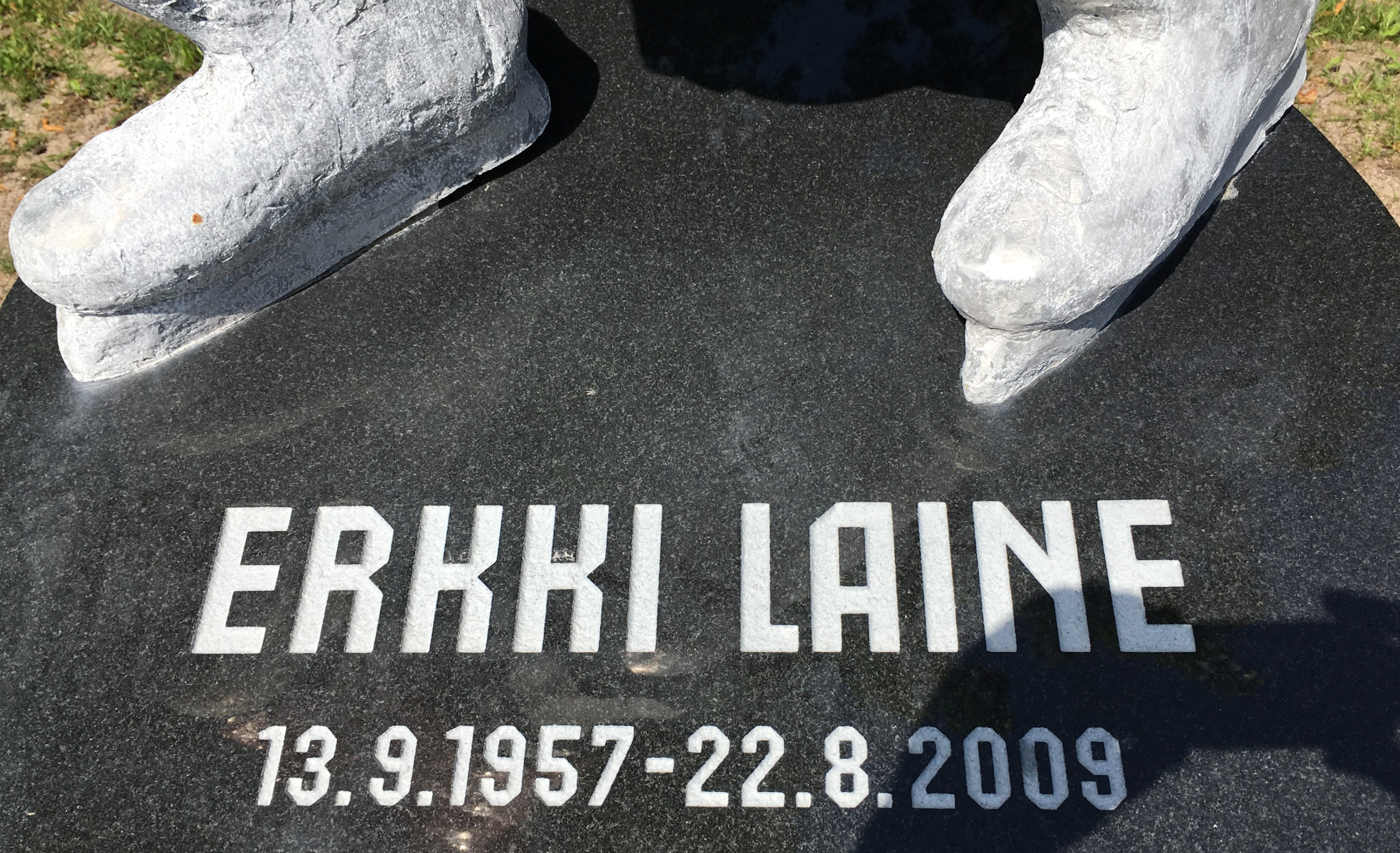 Erkki Laine Statue Bottom